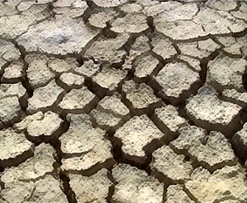 Ausgetrockneter Boden der Etoscha-Pfanne, Namibia